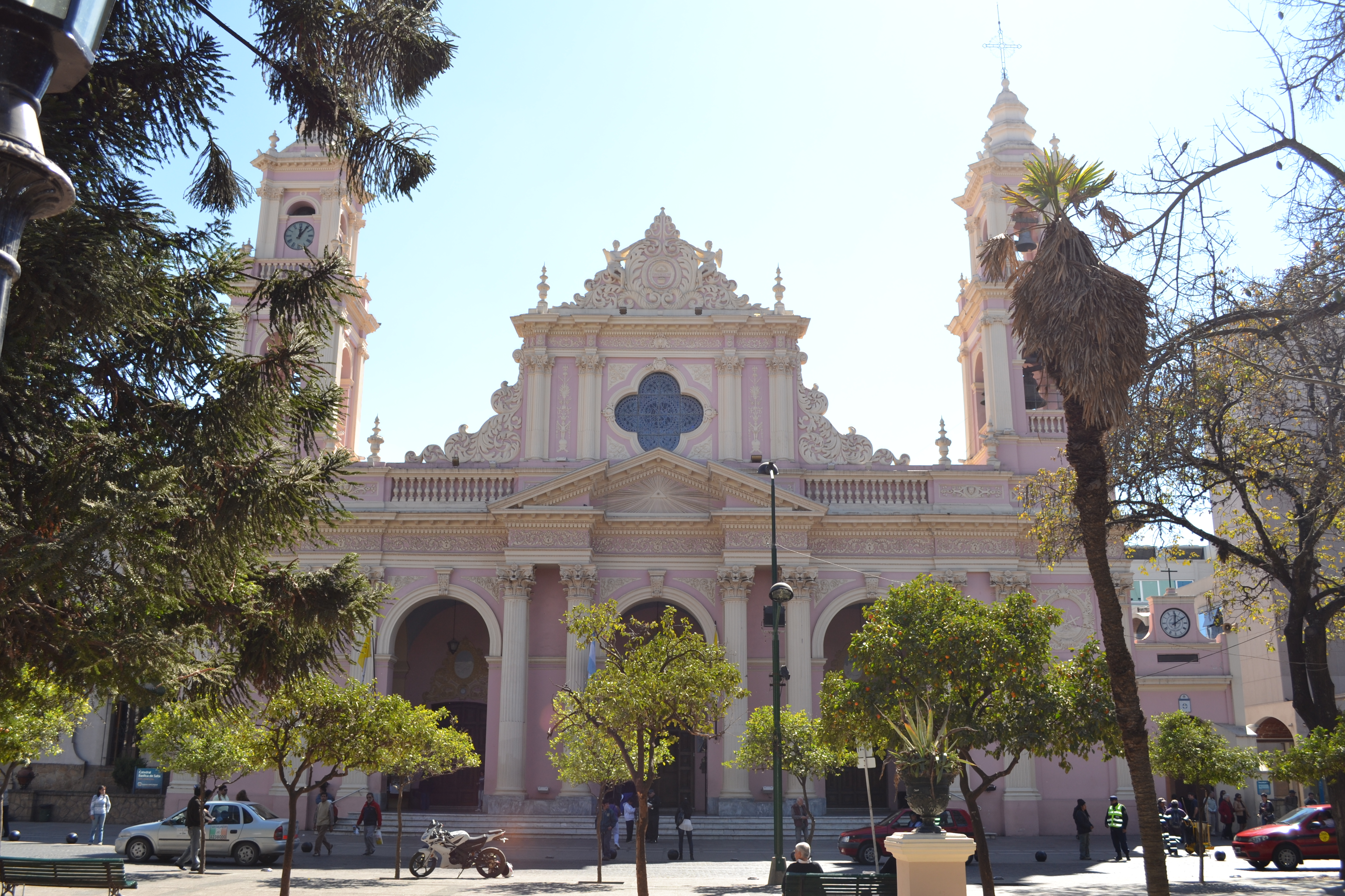 Catedral de Salta.